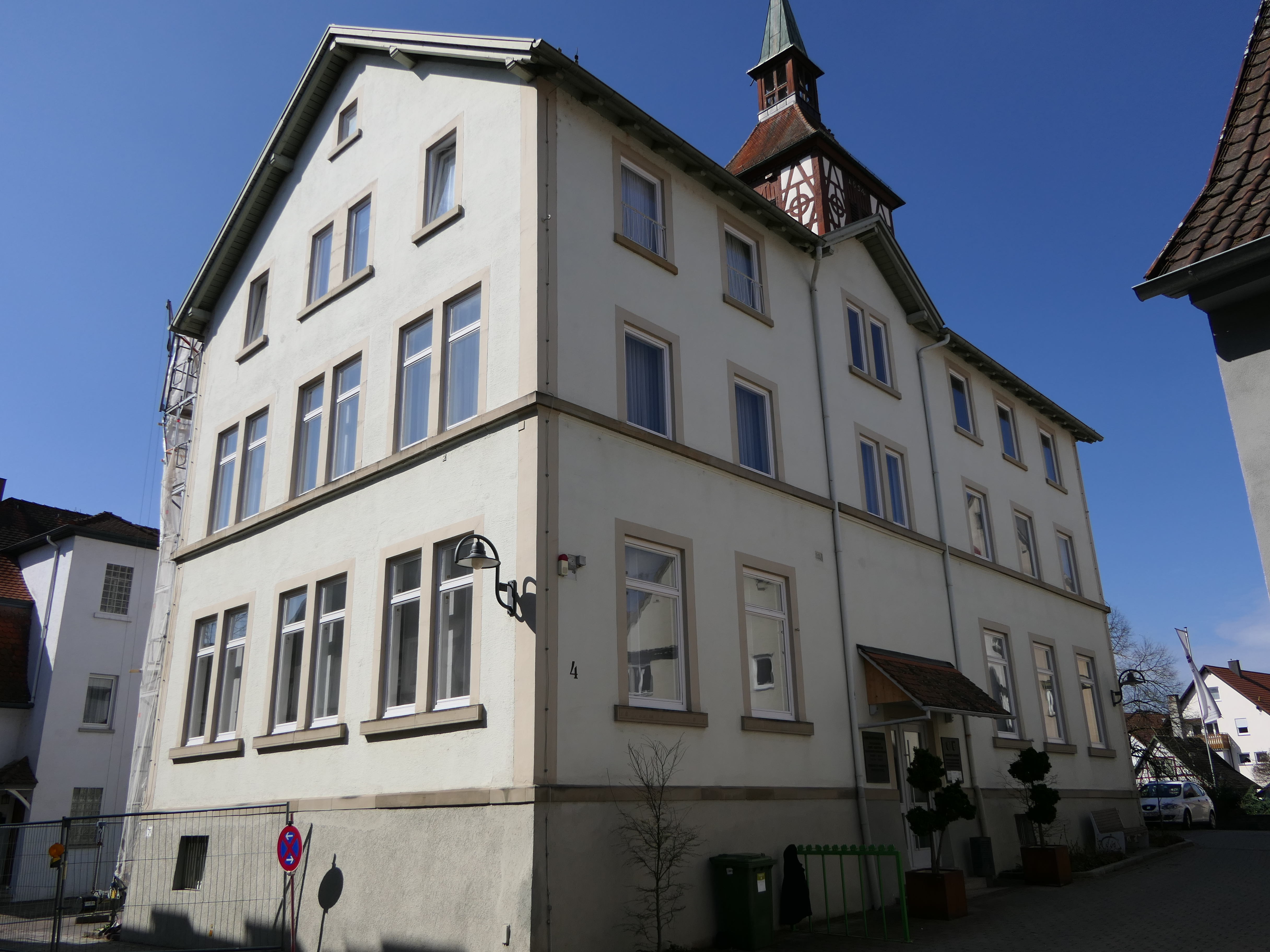 Das Urmensch-Museum im Hans-Trautwein-Haus in Steinheim an der Murr. Ostansicht.